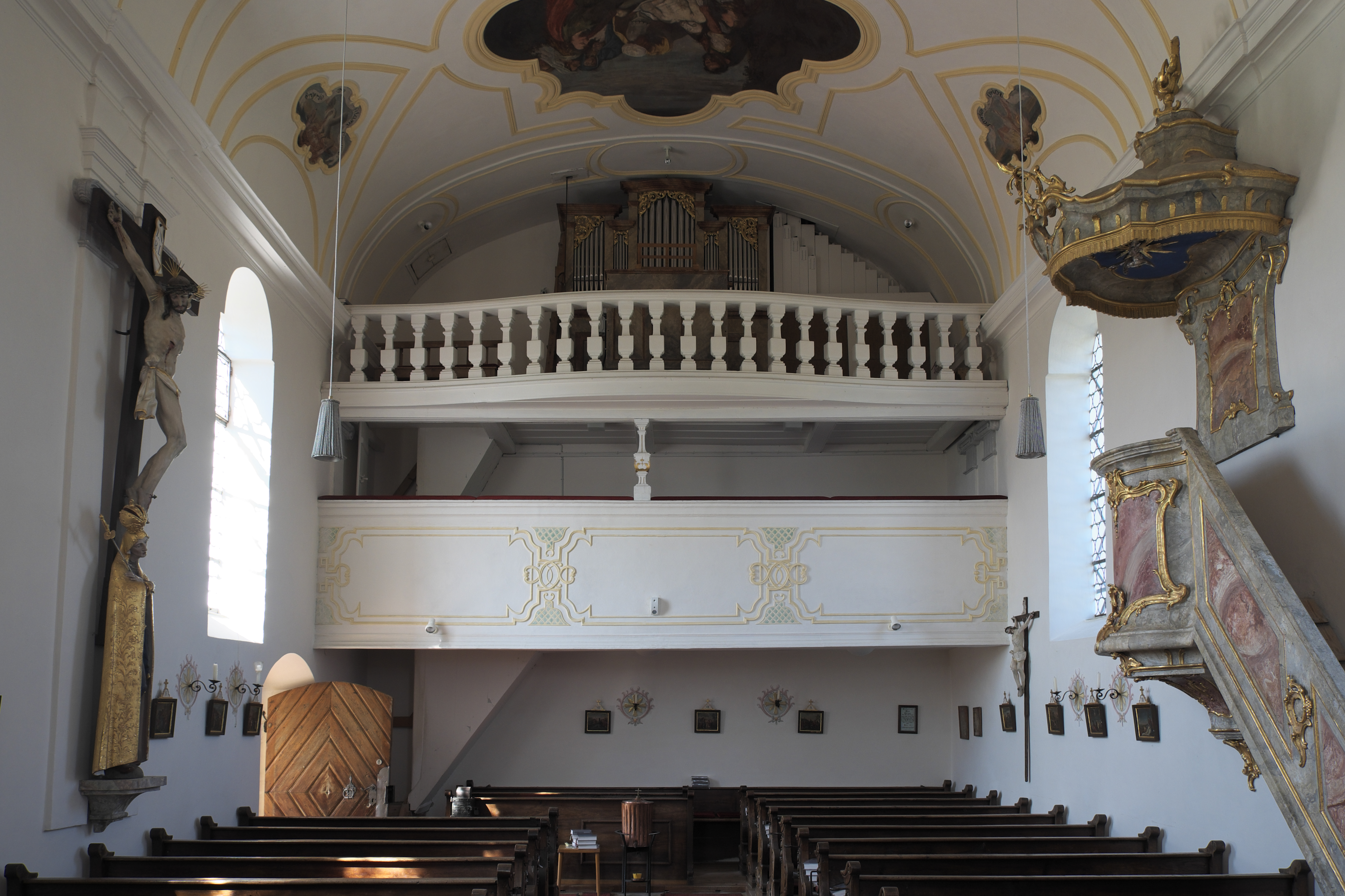 Katholische Filialkirche Mariä Himmelfahrt in Jenhausen, einem Ortsteil von Seeshaupt im Landkreis Weilheim-Schongau (Bayern/Deutschland), Orgelempore